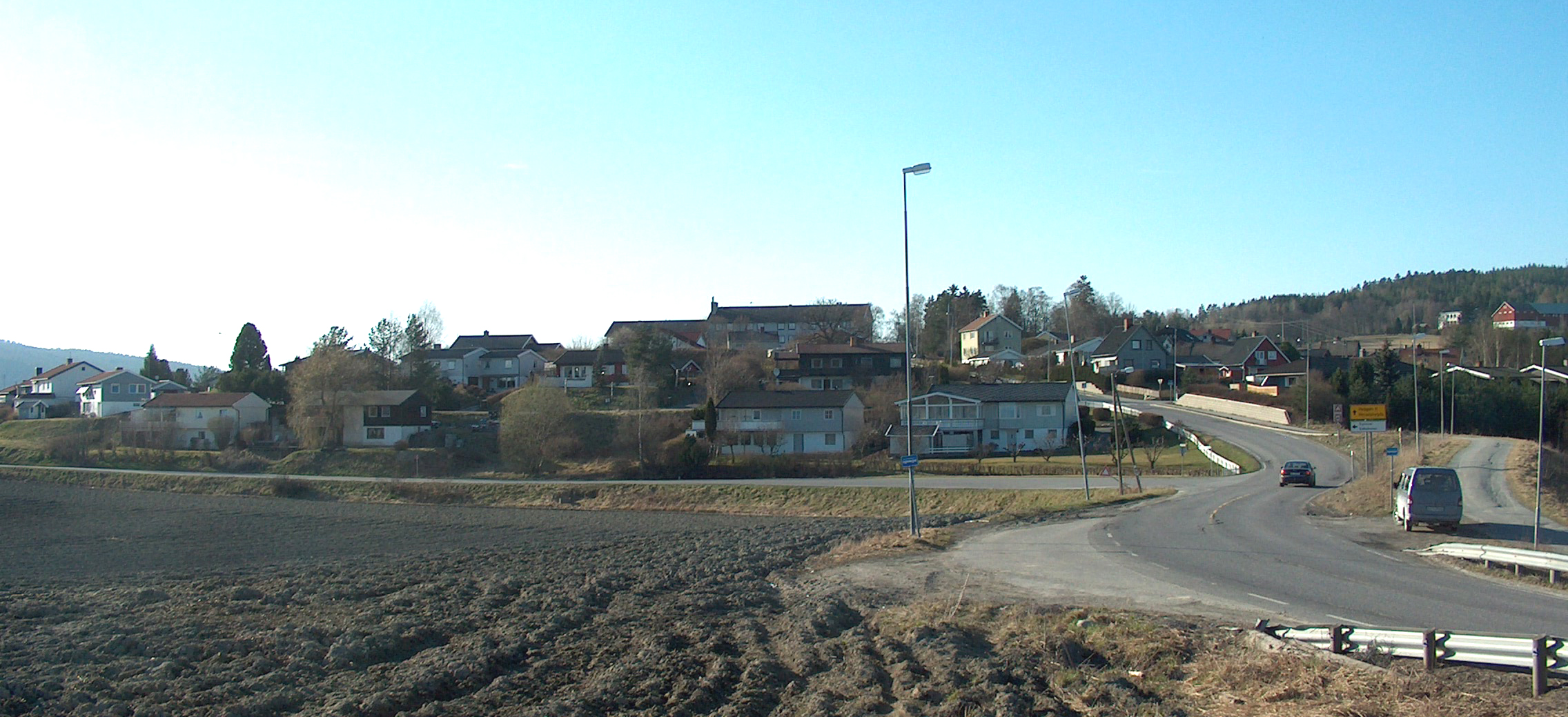 Ve, Norderhovhjemmet og Nedre Heradsbygda, Ringerike